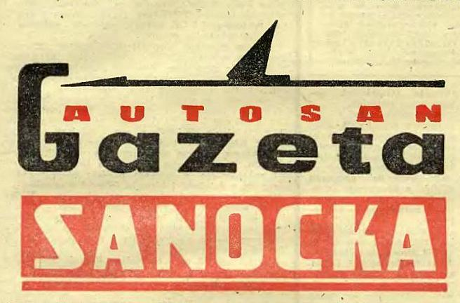 Logo czasopisma pisma "Gazeta Sanocka – Autosan" (1974-1990).